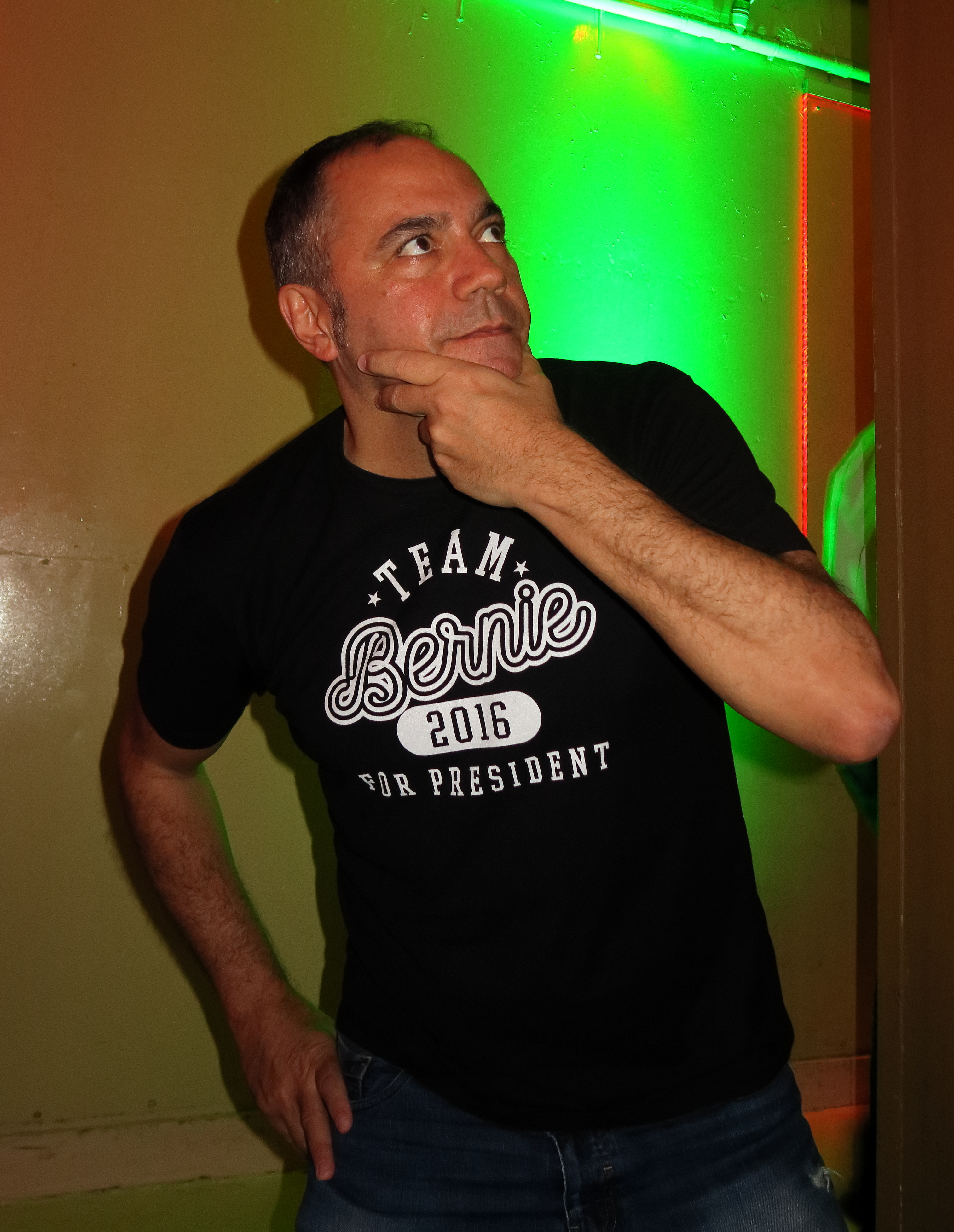 Pepe Colubi, en la sala El Sol para Wikipedia España